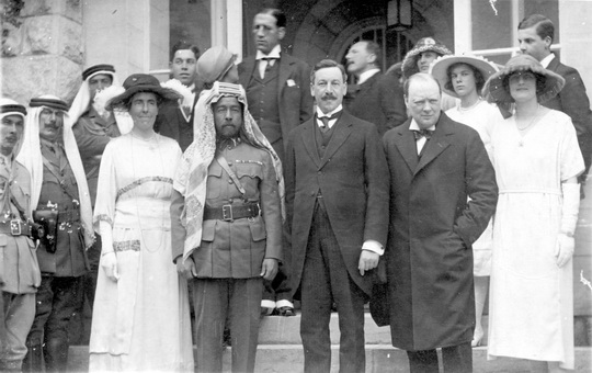 1921 ביקור וינסטון צ'רצ'יל שר המושבות בממשלת אנגליה במזה"ת. ביקור שהביאו לייוזמת הספר הלבן הבריטי לא"י שהביא למסירת עבר הירדן לאמיר עבדאללה ועיראק לפייסל: מימין: צ'רצ'יל, הרברט סמואל, האמיר עבדאללה, אשת סמואל, מאחור למעלה ג'ימס רוטשילד.